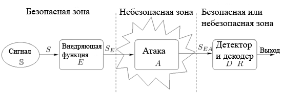 Жизненный цикл ЦВЗ